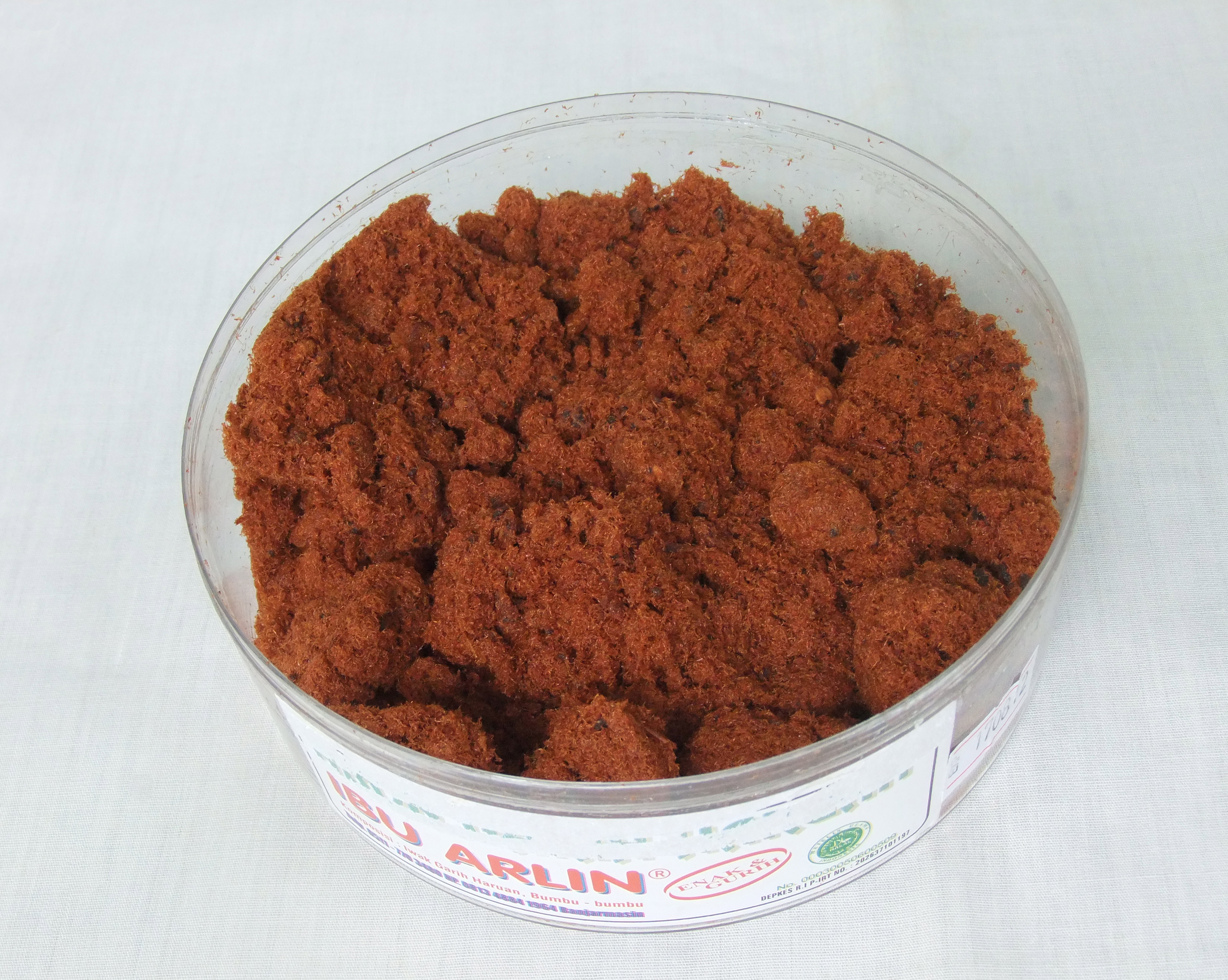 Abon Garih Haruan Iwak Garih Haruan